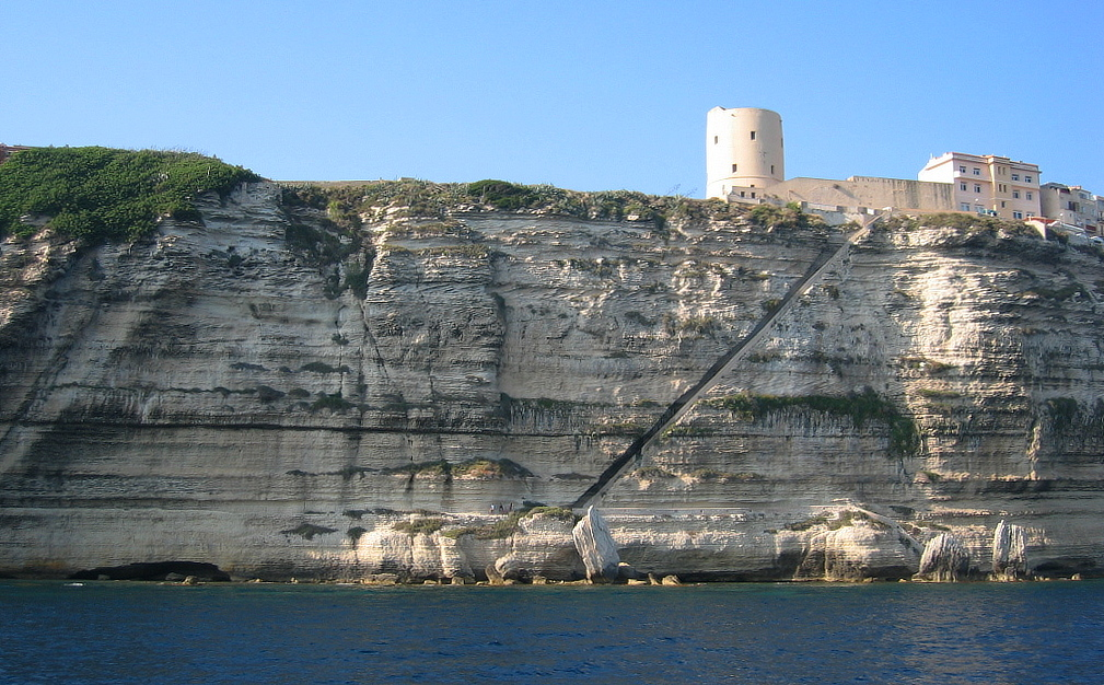 Bonifacio (Corse-du-Sud, France)